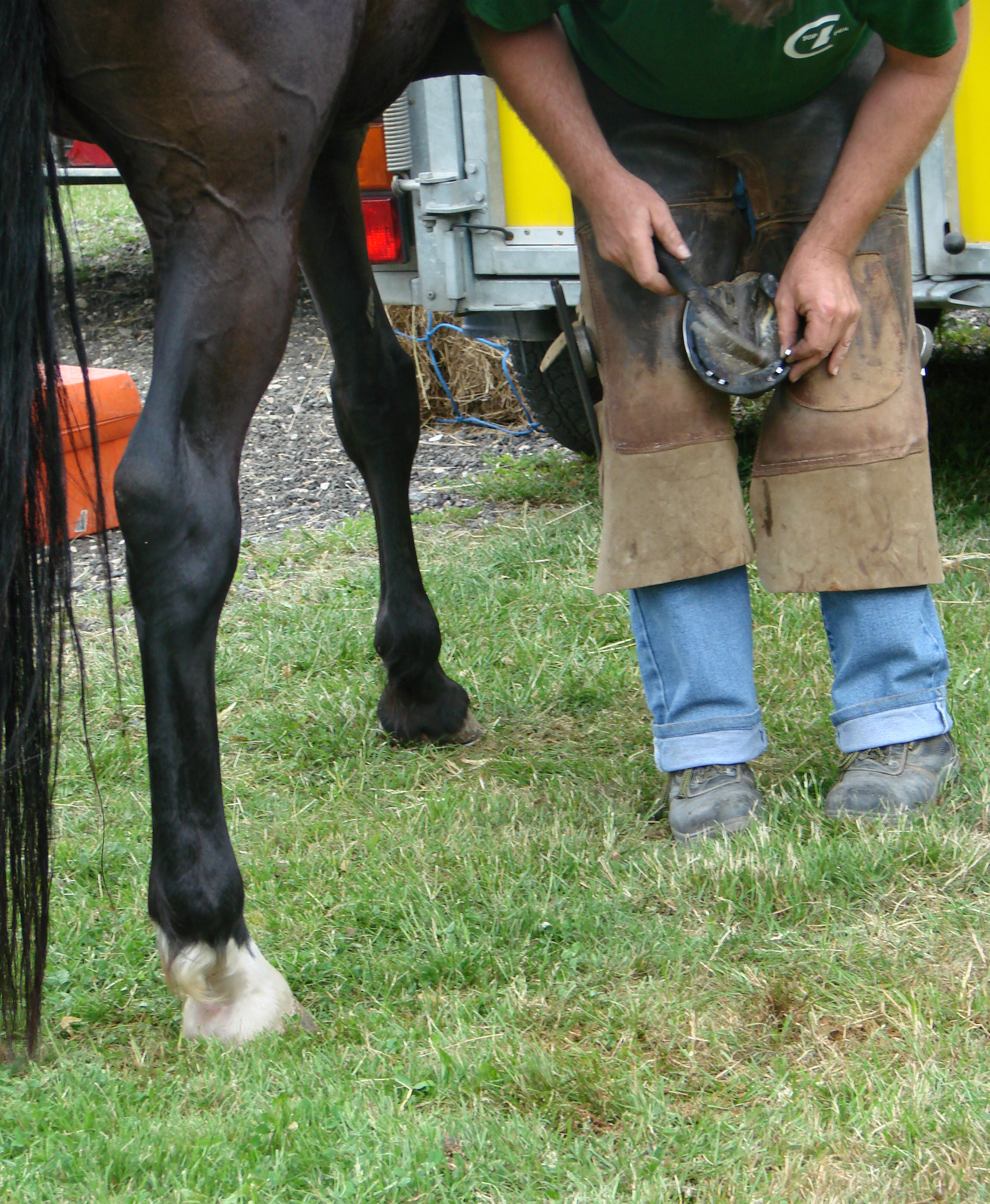 Les clous sont posés en partant du milieu et en procédant alternativement de chaque côté.